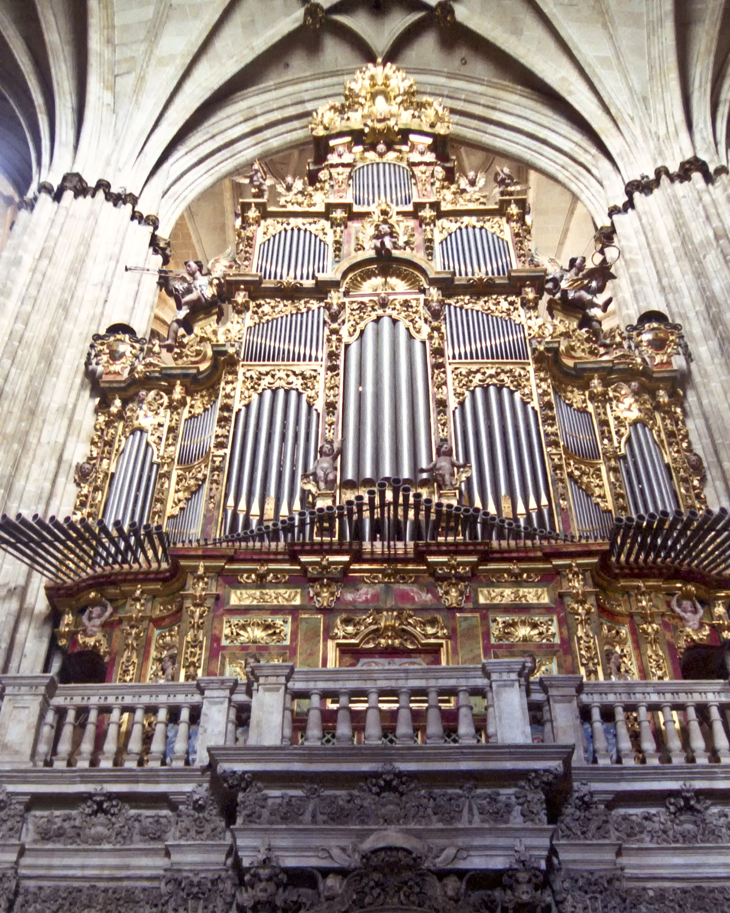 Baroque Organ, Nueva Catedral, Salamanca